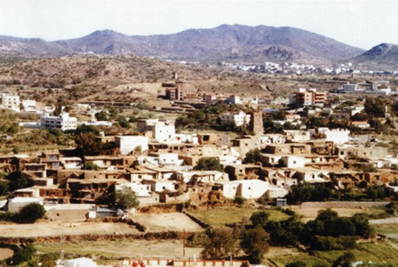 حصون بلاد قبيلة حوالة